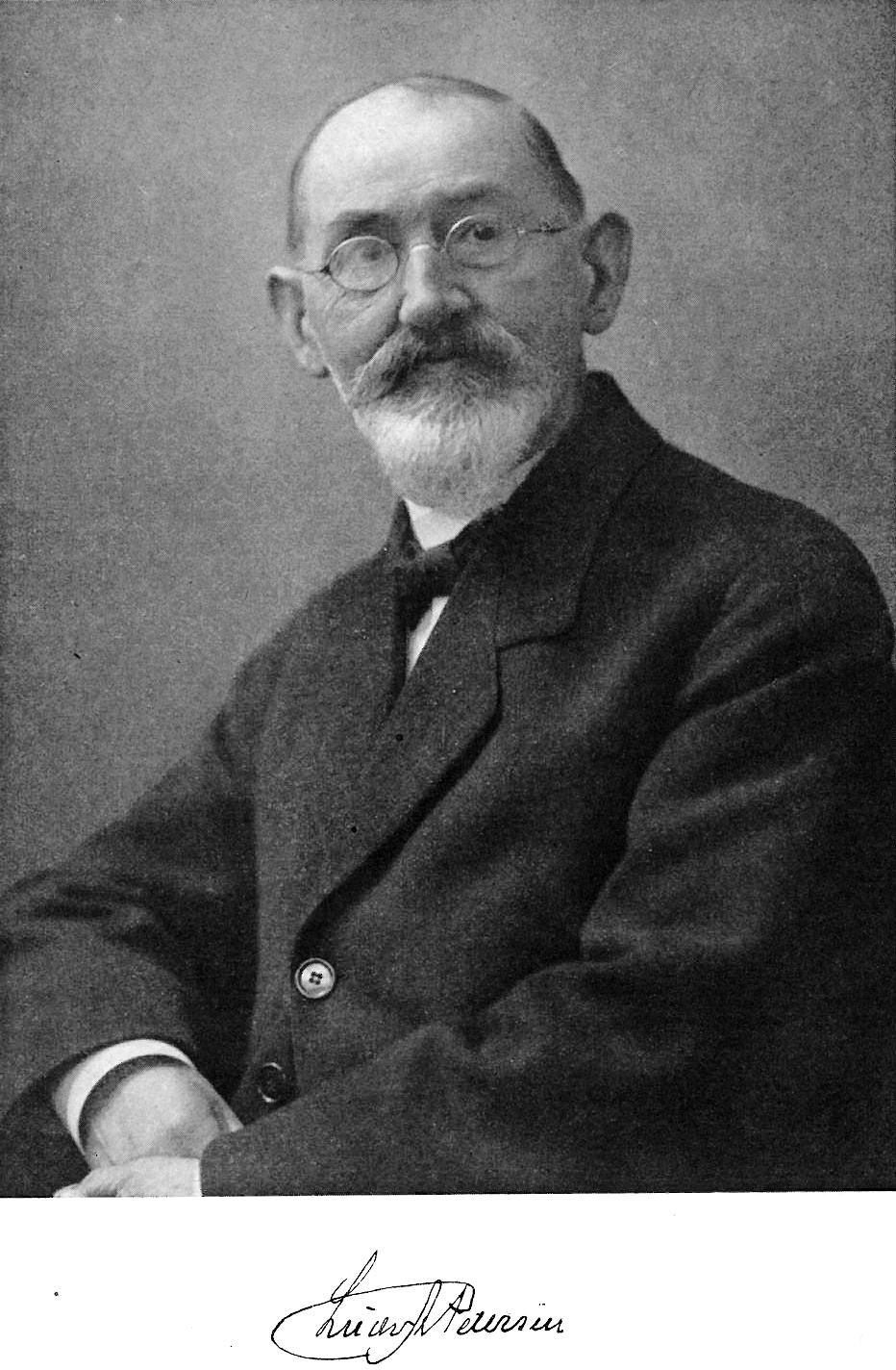 Ludvig A. Petersen (1848-1935), Dansk arkitekt